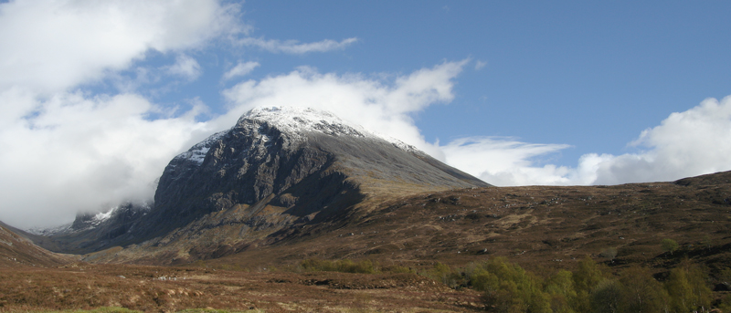 Subtop van de Ben Nevis, van uit het noorden gezien.